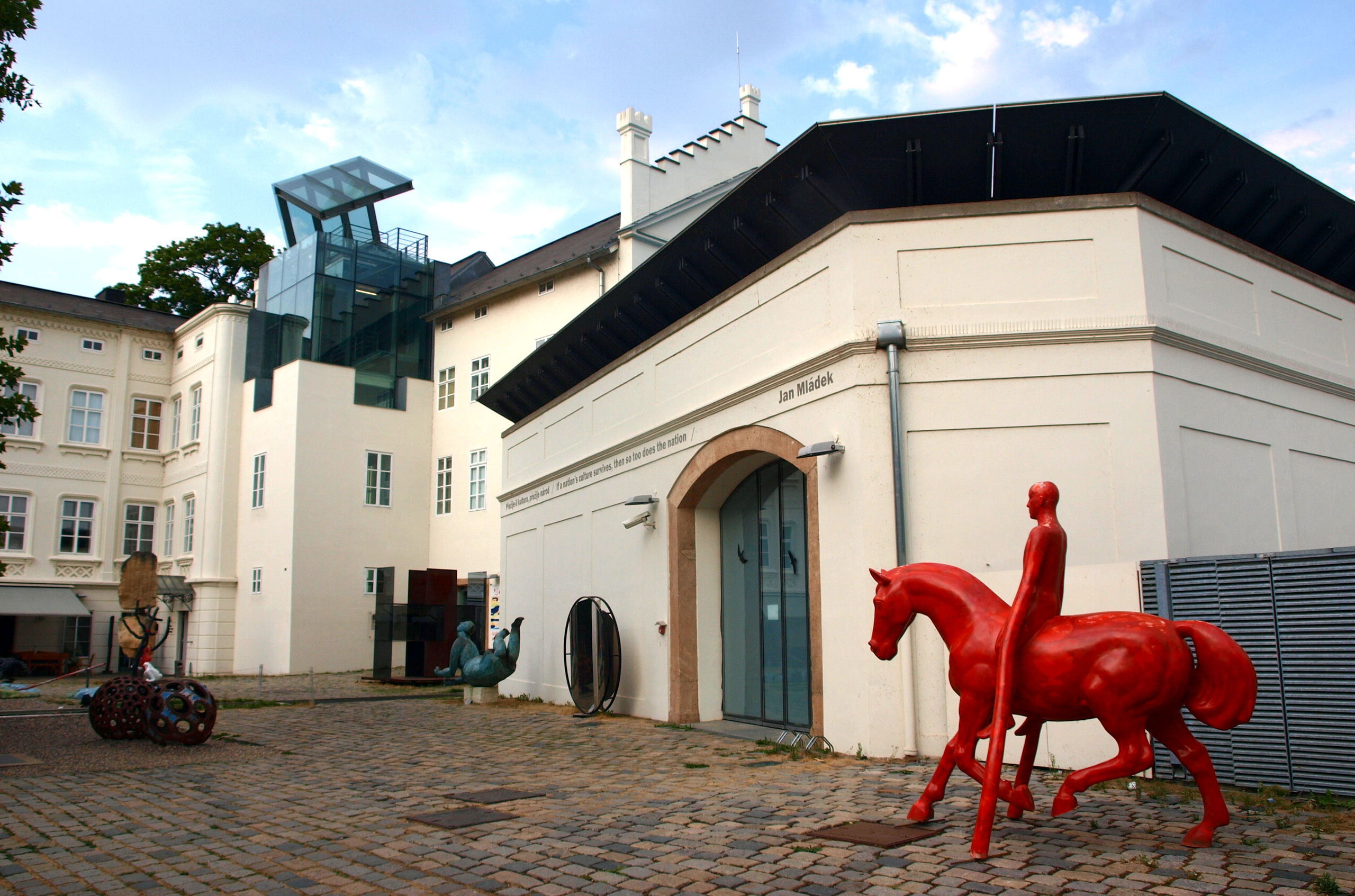 Muzeum Kampa